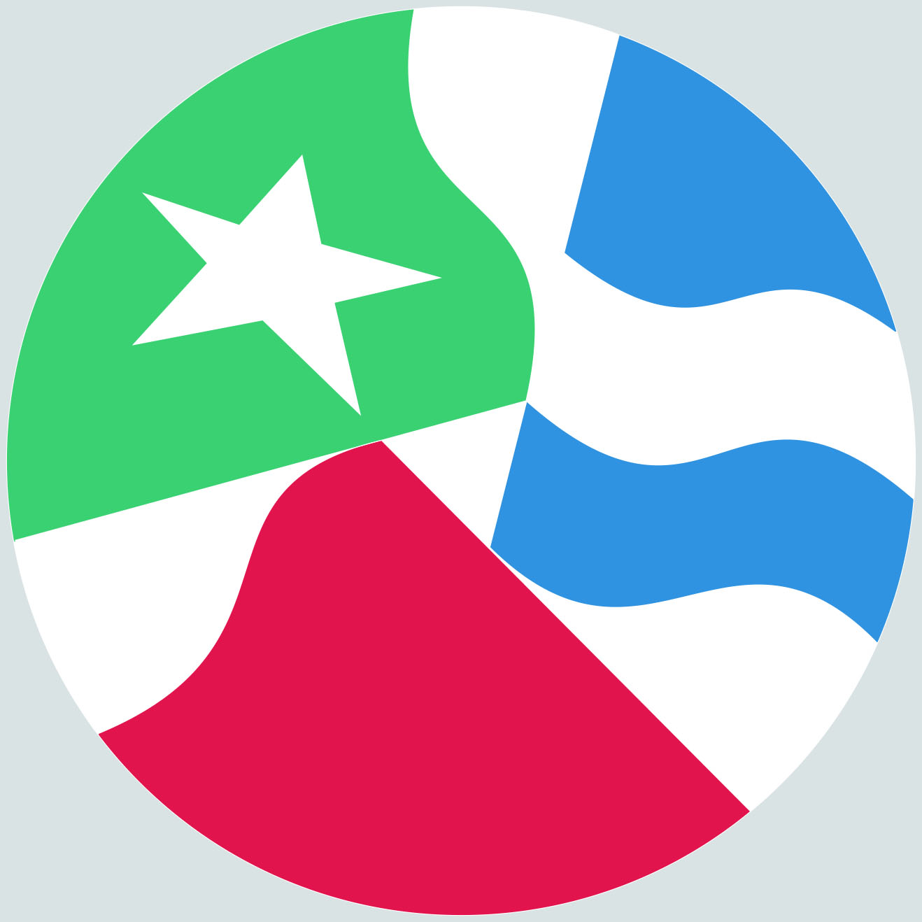 ＹＦＵロゴ